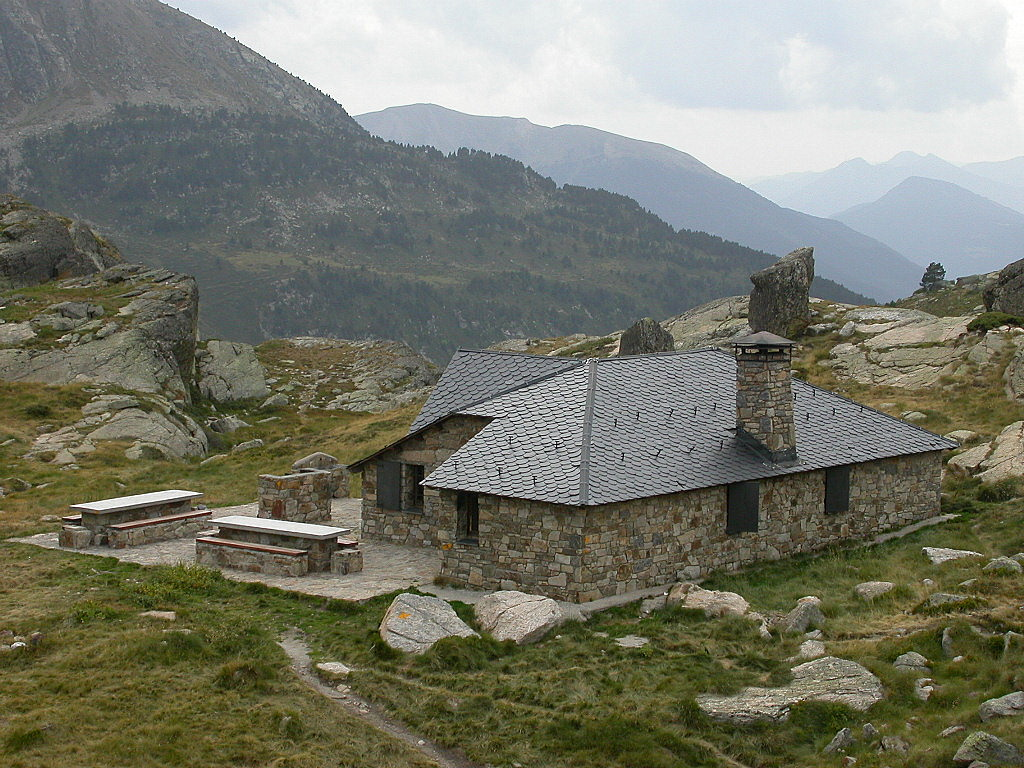 Refuges Andorre Refugi de Juclar